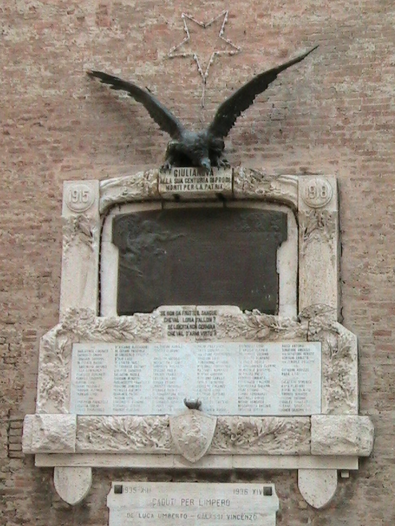 Giulianova - Duomo - Monumento ai Caduti della Prima guerra mondiale e ai Caduti dell'Impero